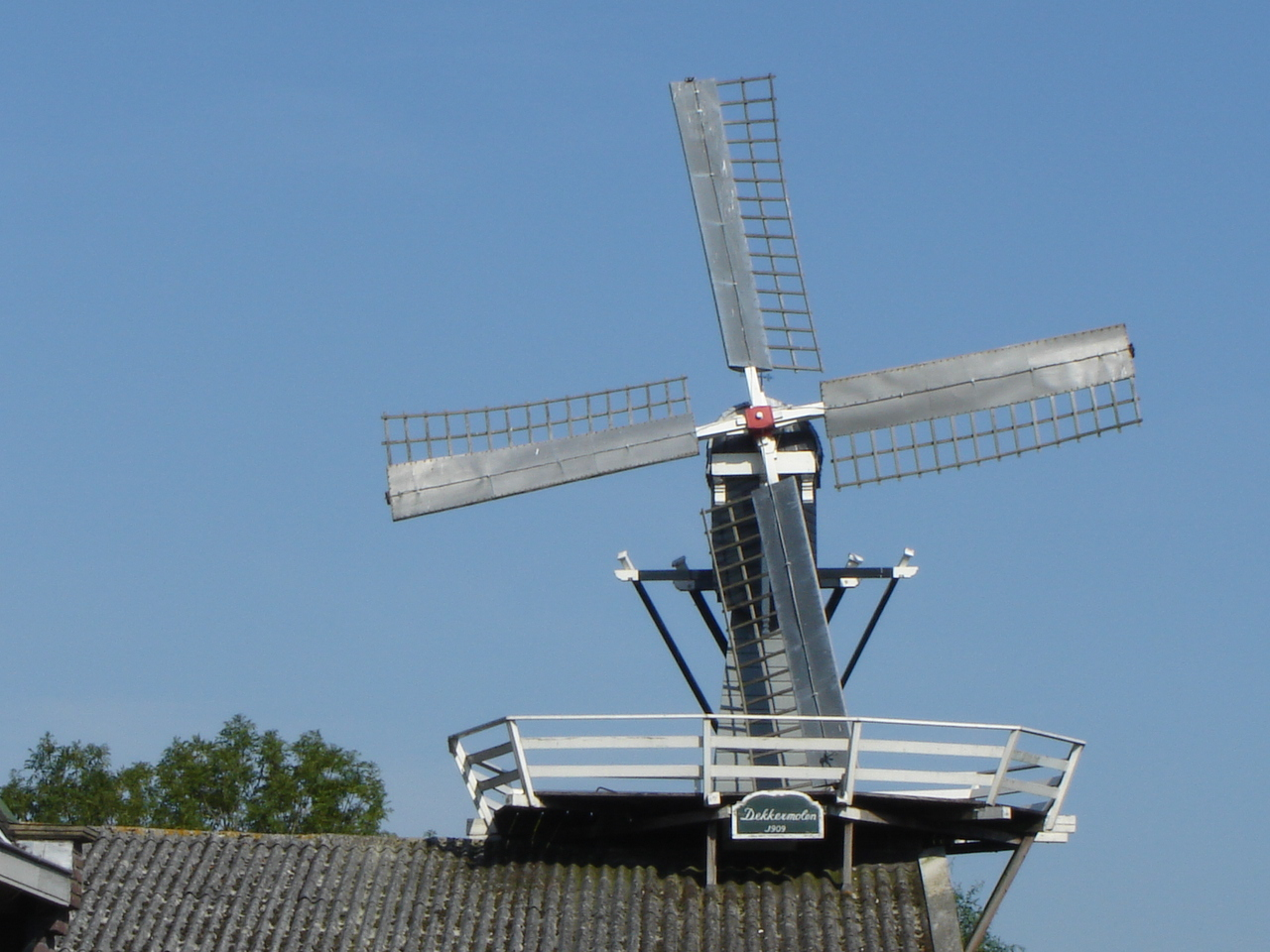 Vanaf 20 maart 1976 tot 15 januari 2009 heeft dit zogenaamde lattenzagertje op het dak van een houten schuur gestaan, achter Herenweg 38 te Rijnsaterwoude